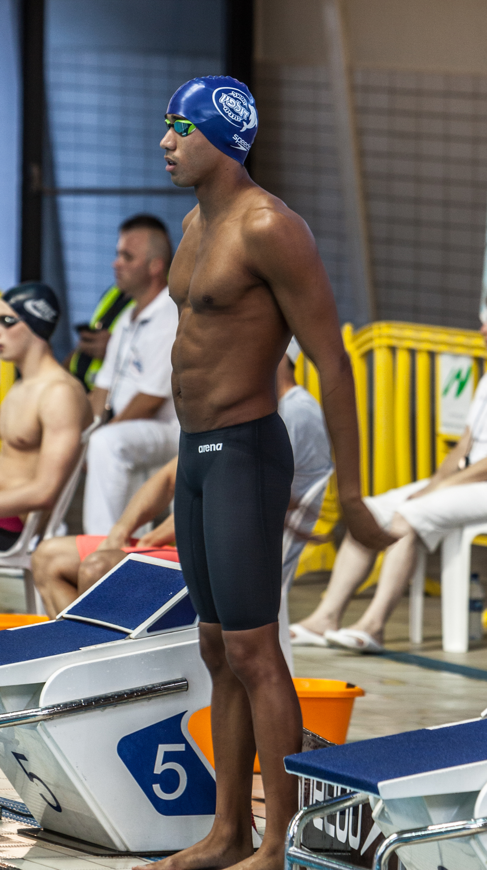 מרכוס ג'ון שלזינגר, אליפות ישראל בשחייה 2015